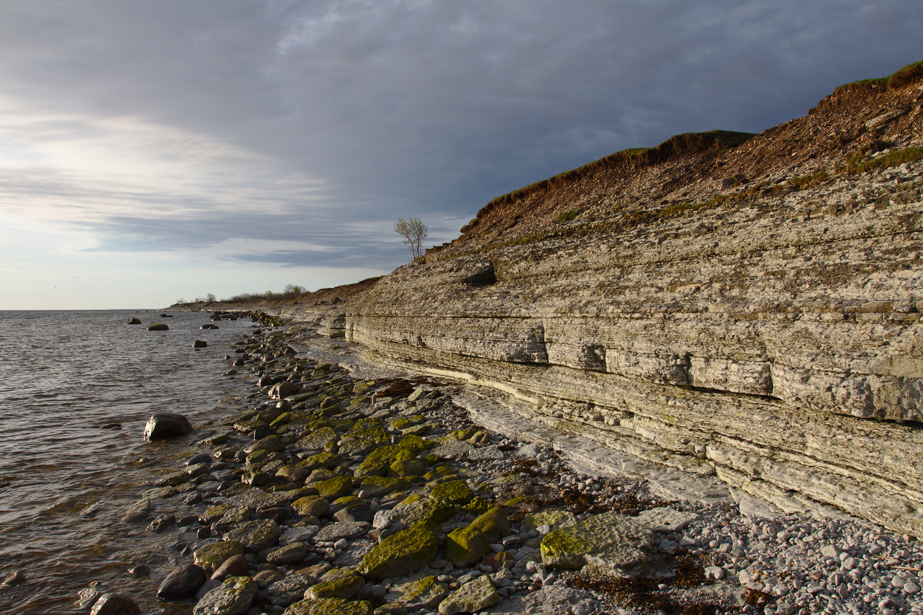 Pankrannik. Osmussaare maastikukaitseala